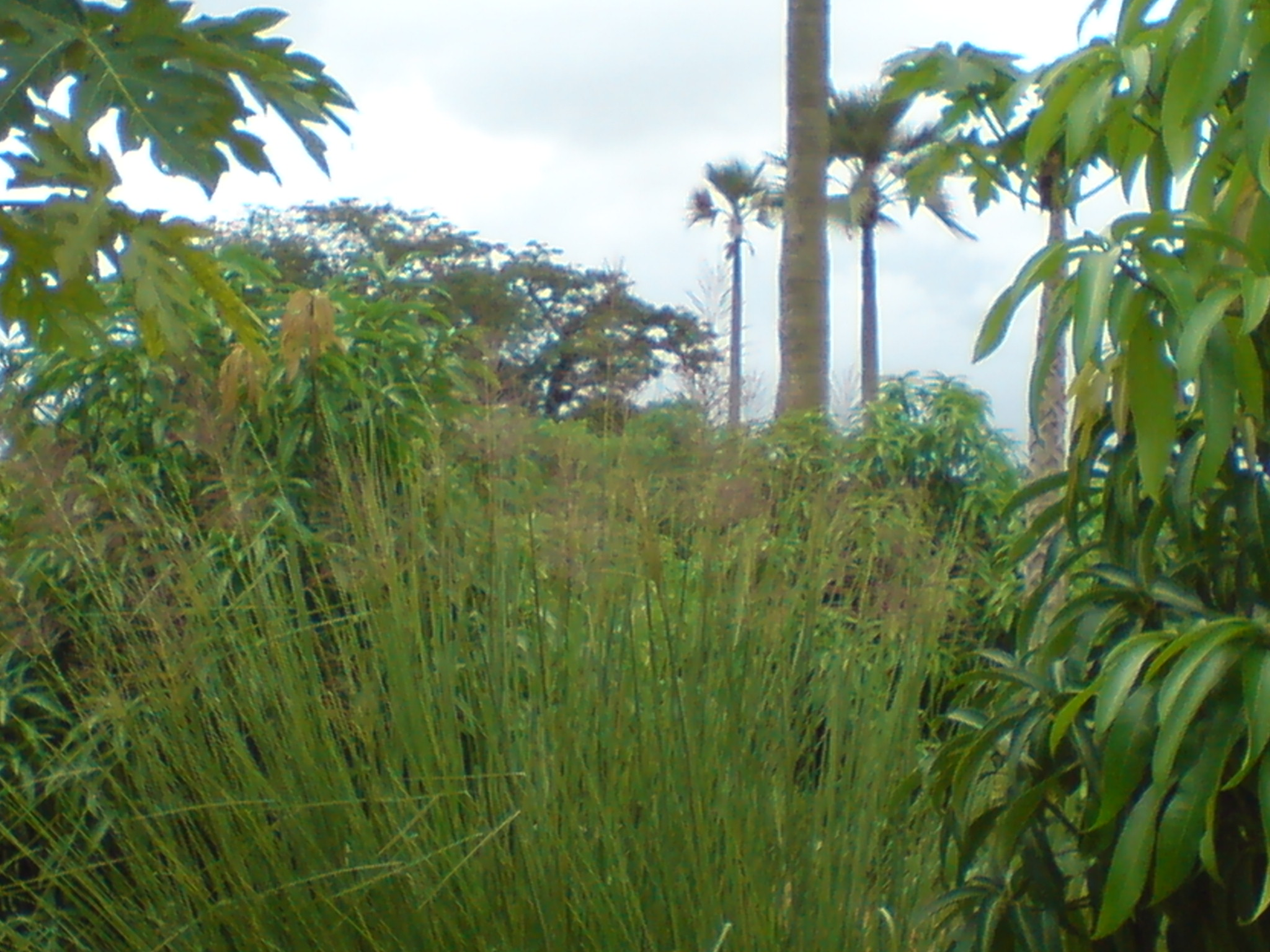 utilisation du vetiver dans un champs